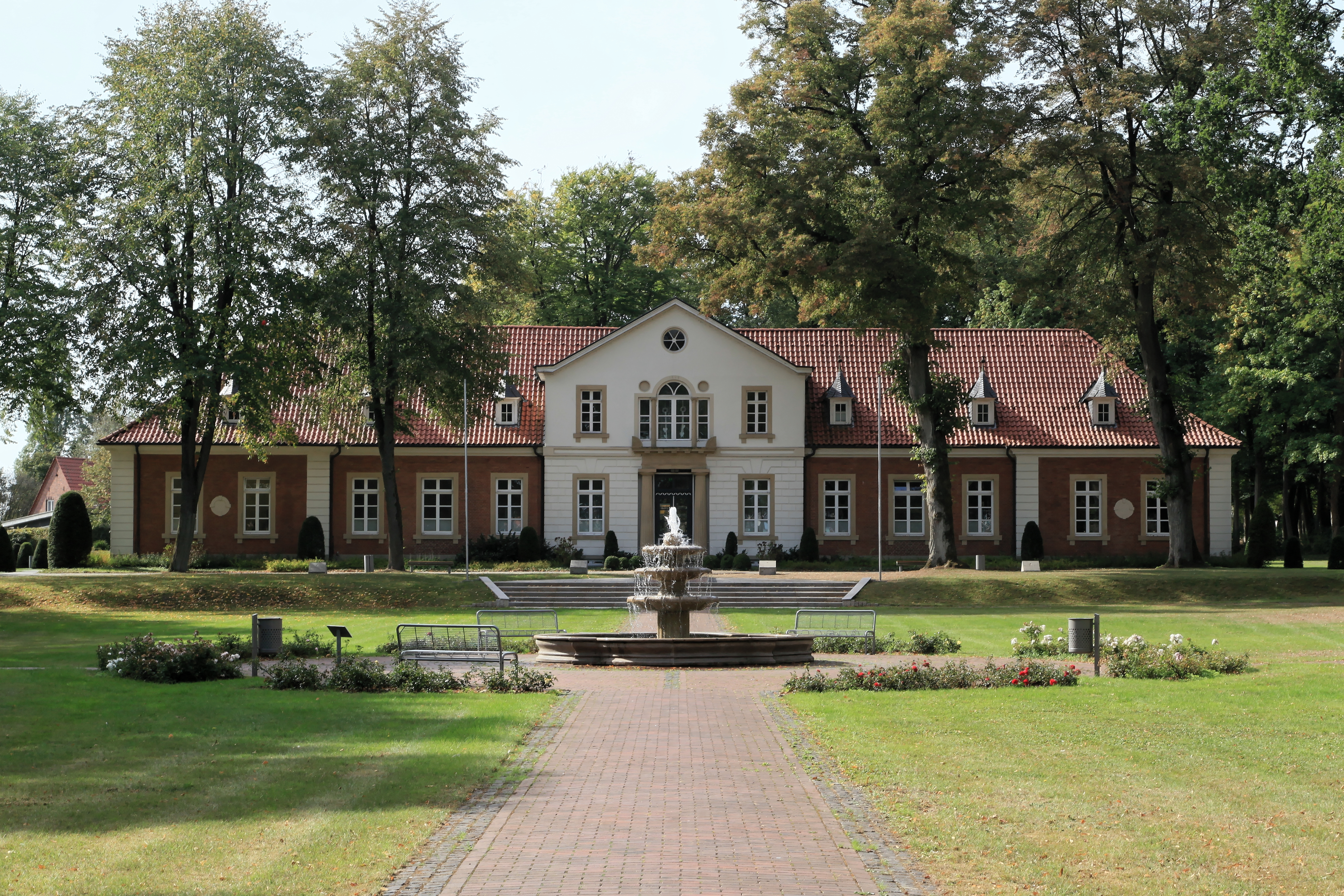 Gebäude Ludmillenhof im Park Ludmillenhof, Bahnhofstraße/Berßener Straße in Sögel